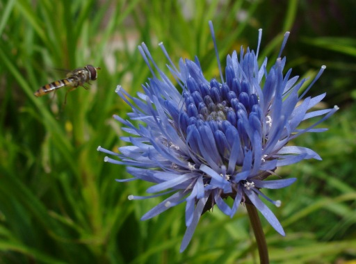 Jasione laevis, Jasione vivace, Dieppe